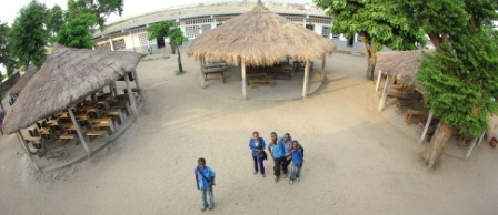 Vue de la cour de l'ecole speciale Brazzaville